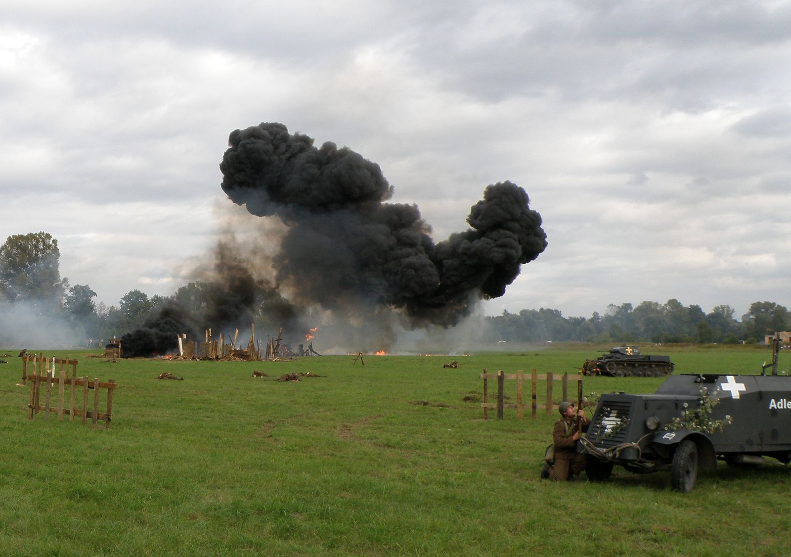 Bitwa pod Łomiankami, rekonstrukcja 10.09.2011